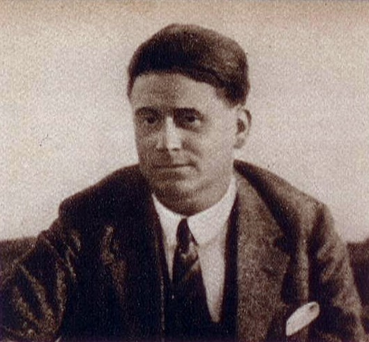 František Bidlo (1895 - 1945), Český kreslíř, karikaturista a ilustrátor.